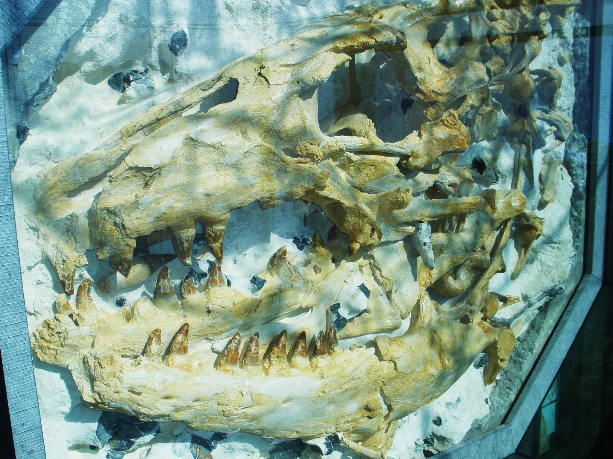 Fossil of Prognathodon, an extinct mosasaur- Took the photo at Natural History Museum of Maastricht